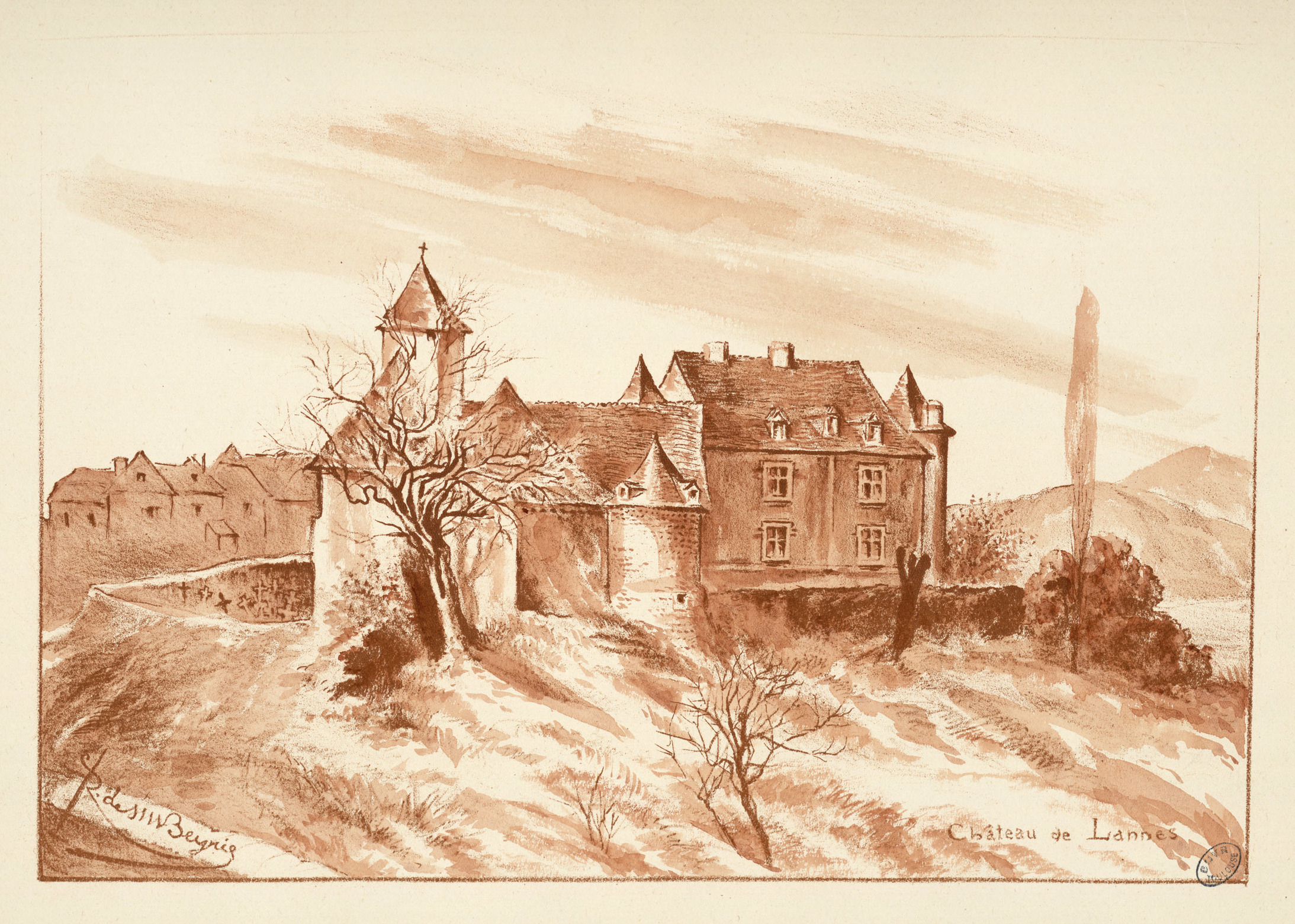 Ancely, René (1876 - 1966). Possesseur